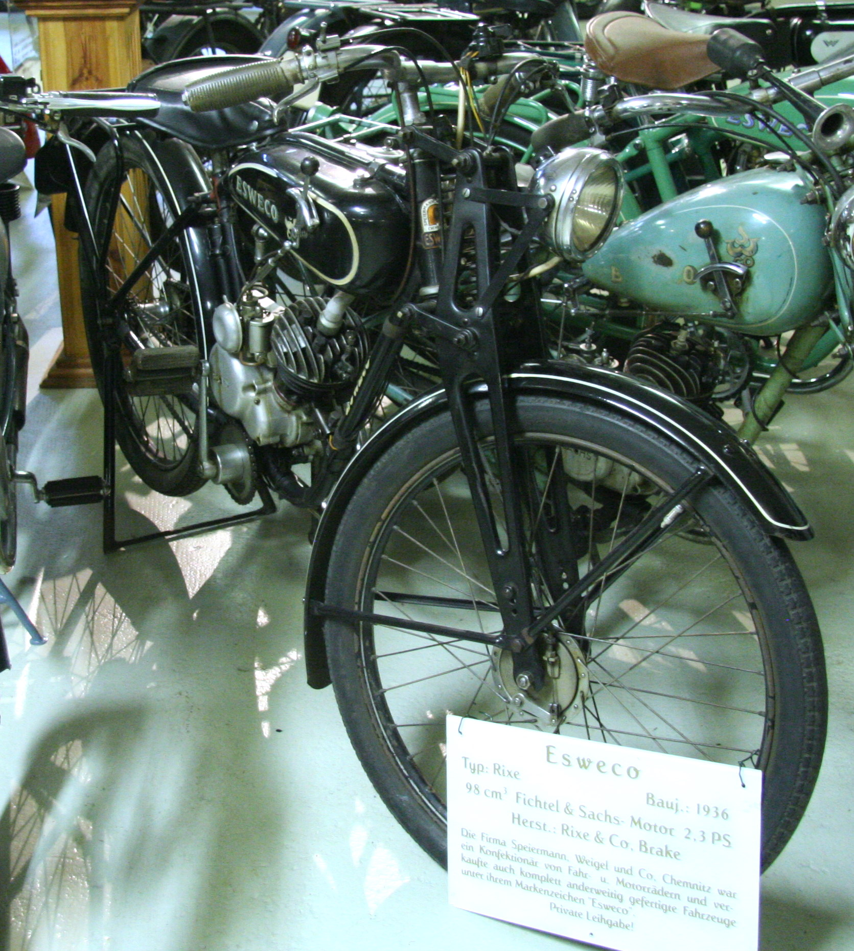 Esweco Modell, Hersteller Rixe & Co, Brake, mit einem Fichtel & Sachs Motor, 98 cm³ und 2,3 PS, Baujahr 1936, ursprünglicher Vertrieb durch die Firma Speiermann, Weigel und Co in Chemnitz, Ausstellungsstück im Museum für sächsische Fahrzeuge in Chemnitz.